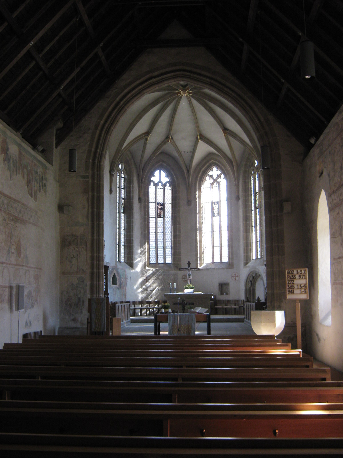 Die denkmalgeschützte evangelische Marienkirche Im Wiesaztal 10 in Bronnweiler bei Reutlingen wurde sie in der ersten Hälfte des 12. Jahrhunderts erbaut. Blick auf das Kirchenschiff und den Chor.